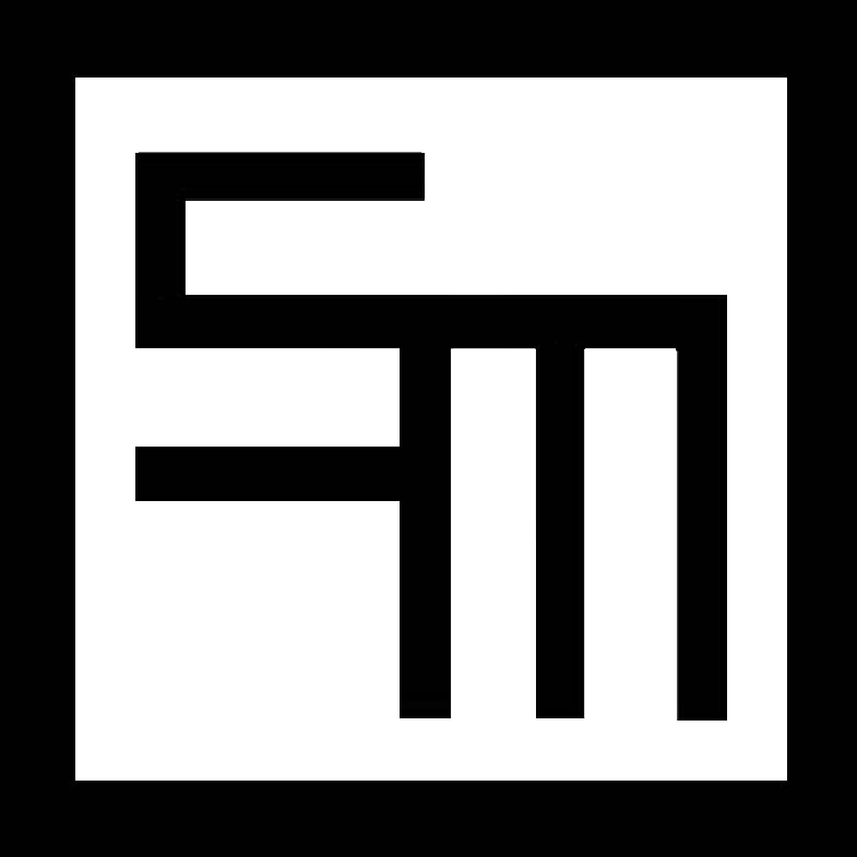 Соня Монина